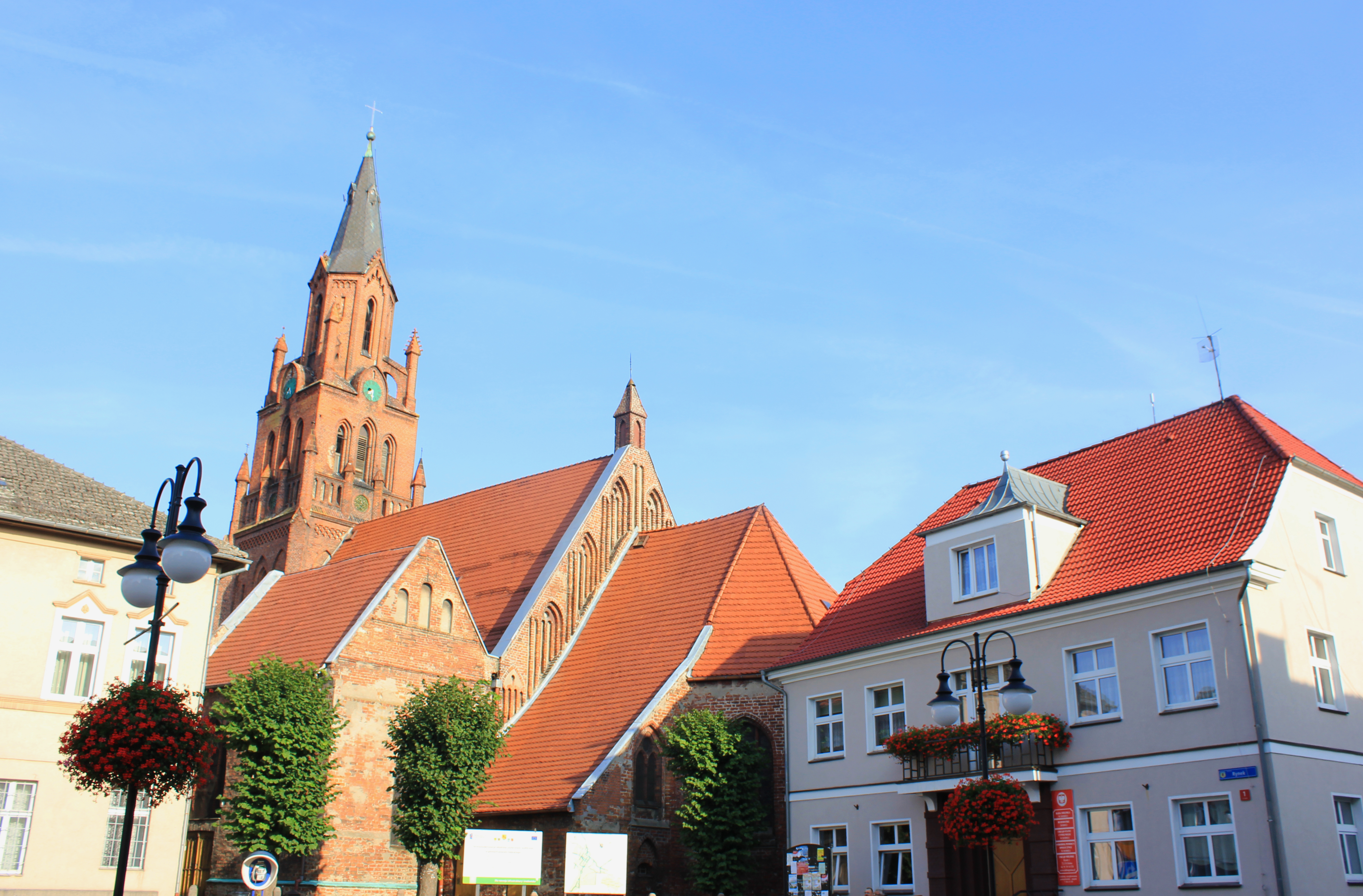 Dobra, teren Starego Miasta. Numer rejestru: 81 z 27.02.1956